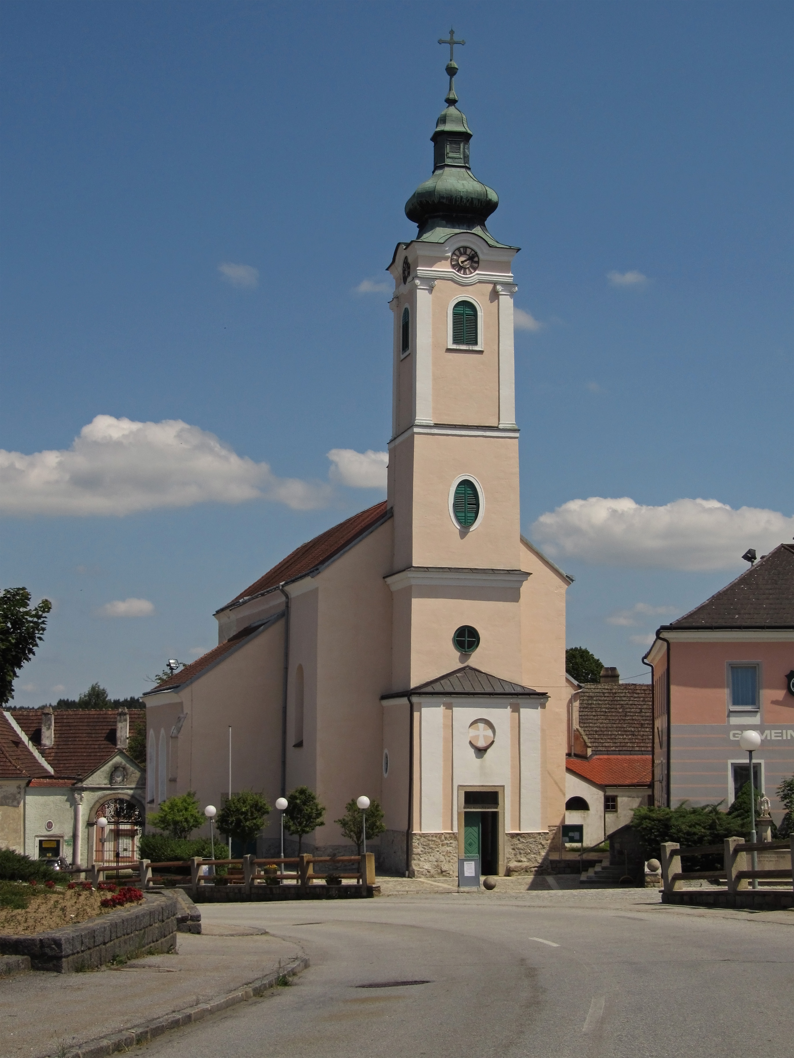 Kath. Pfarrkirche Mariä Himmelfahrt in Eisgarn